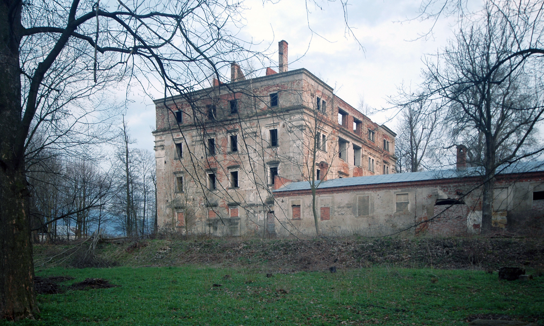 Wilkanów - zespół pałacowy: pałac